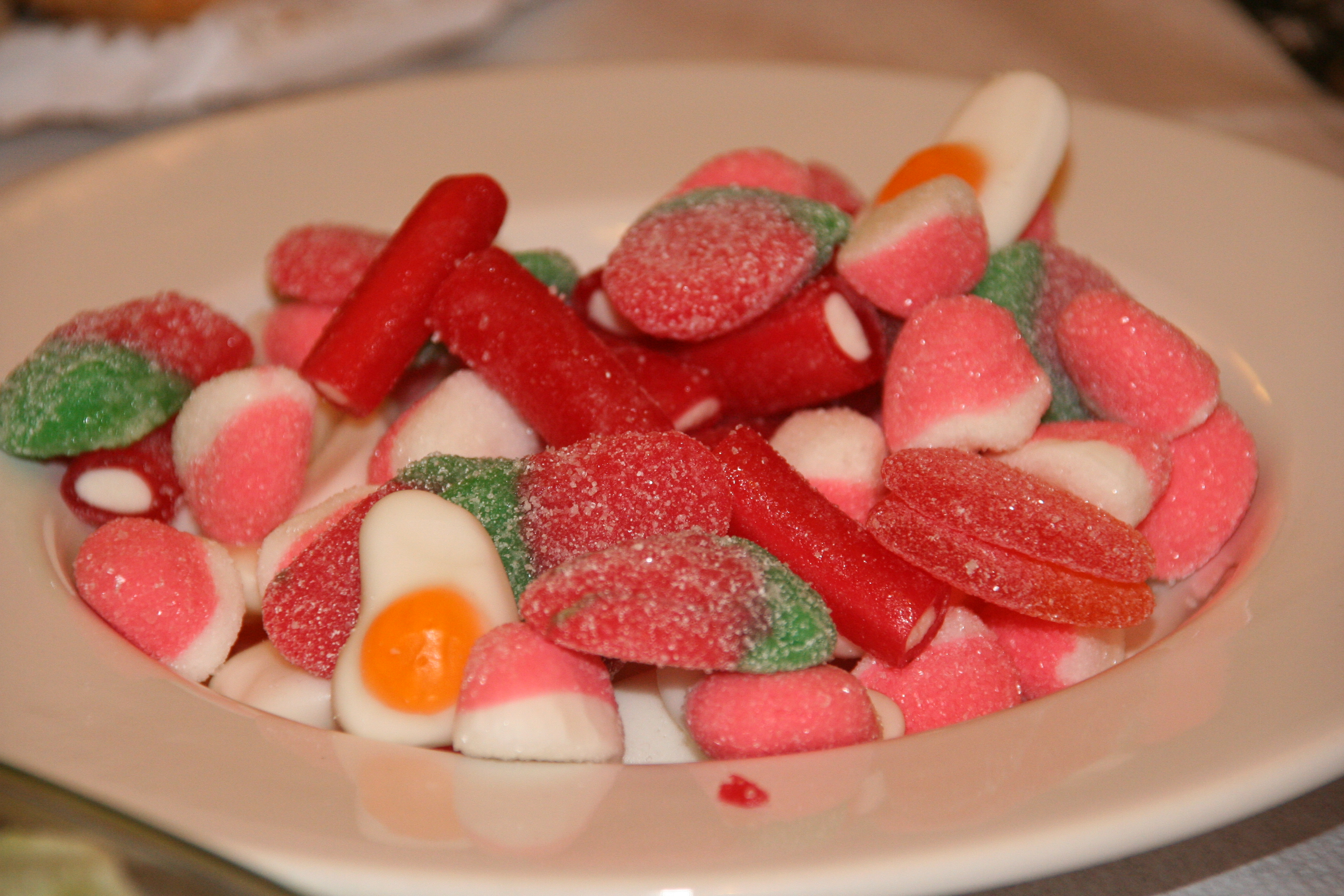 Golosinas en un plato.